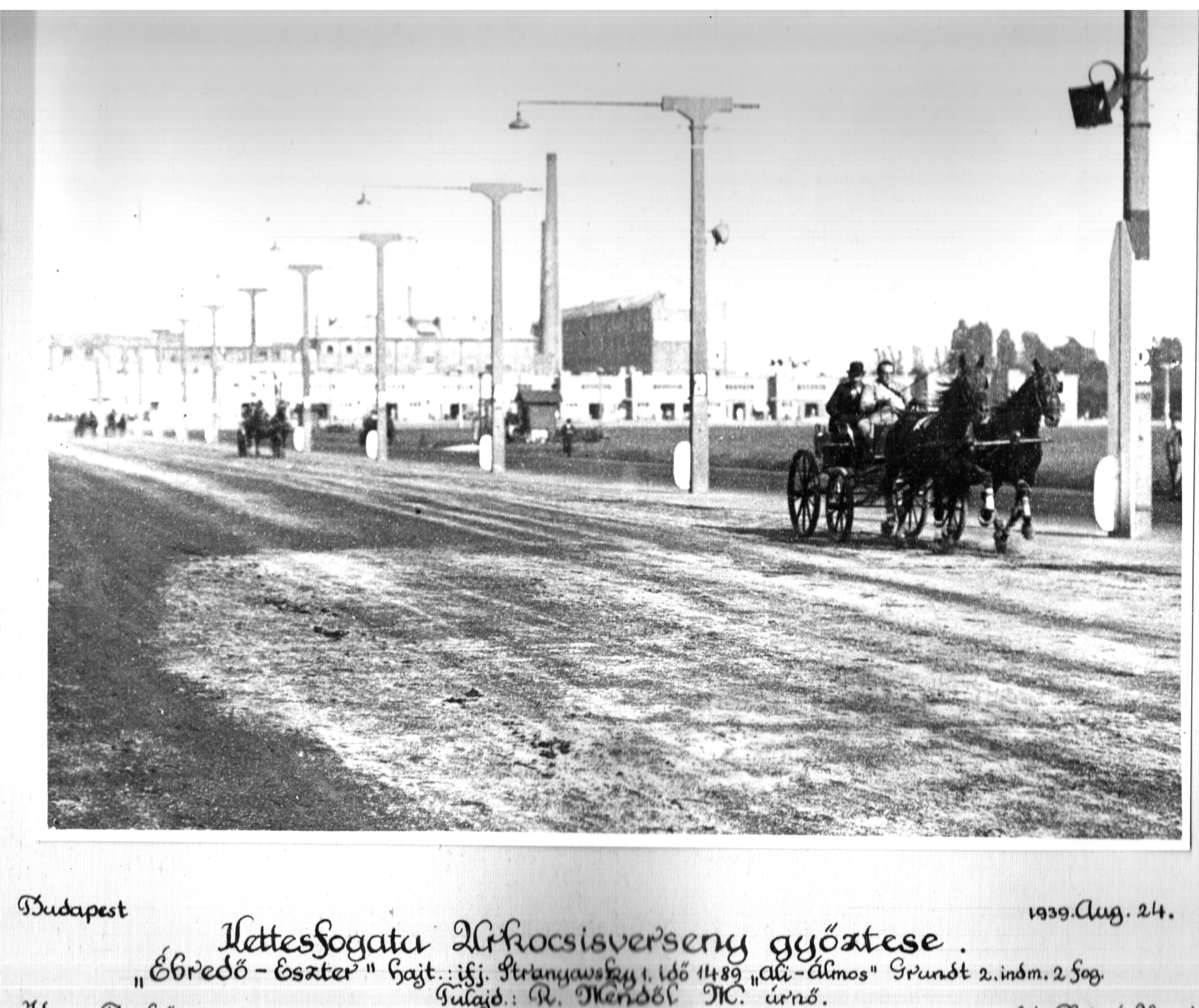 Az ismeretlen szerző felvétele 1939. augusztus 24 -én készült Budapesten, a Lóversenypályán. Kettesfogatú Urkocsiverseny győztese. Az utolsó békeév. Megjelent a hátoldalán levő bélyegzéssel együtt a Metapolisz DVD sorozatban.